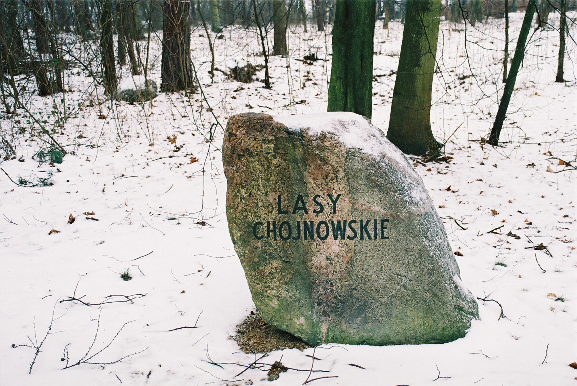 Lasy Chojnowskie głaz Chojnowski Park Krajobrazowy, Lasy Chojnowskie, Poland.